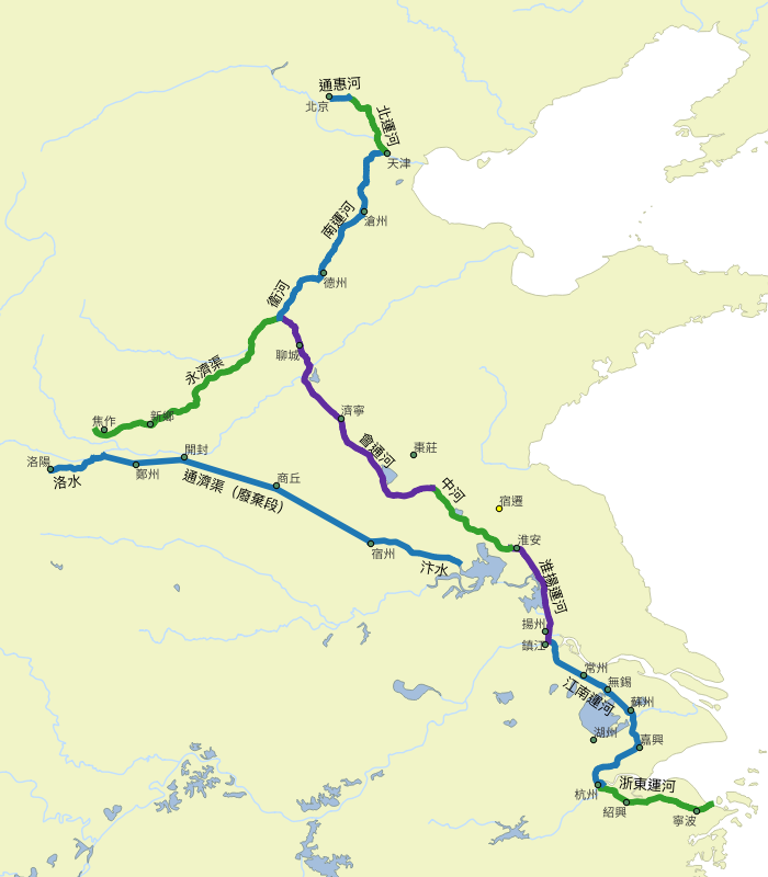 大運河。包括通惠河、北運河、南運河、通濟渠、永濟渠、會通河、淮揚運河、江南運河、浙東運河等。